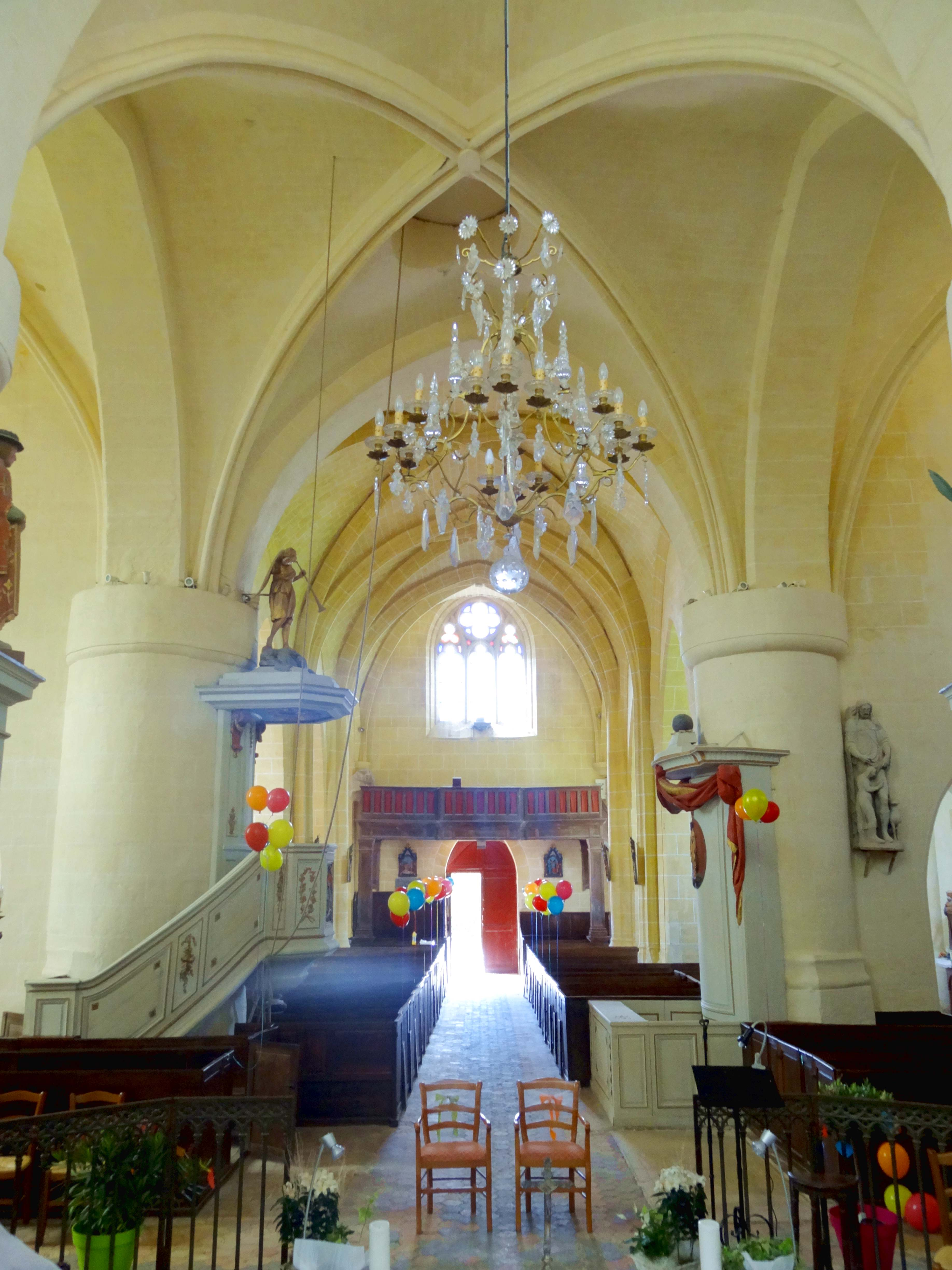 Intérieur de l'église - voir titre.